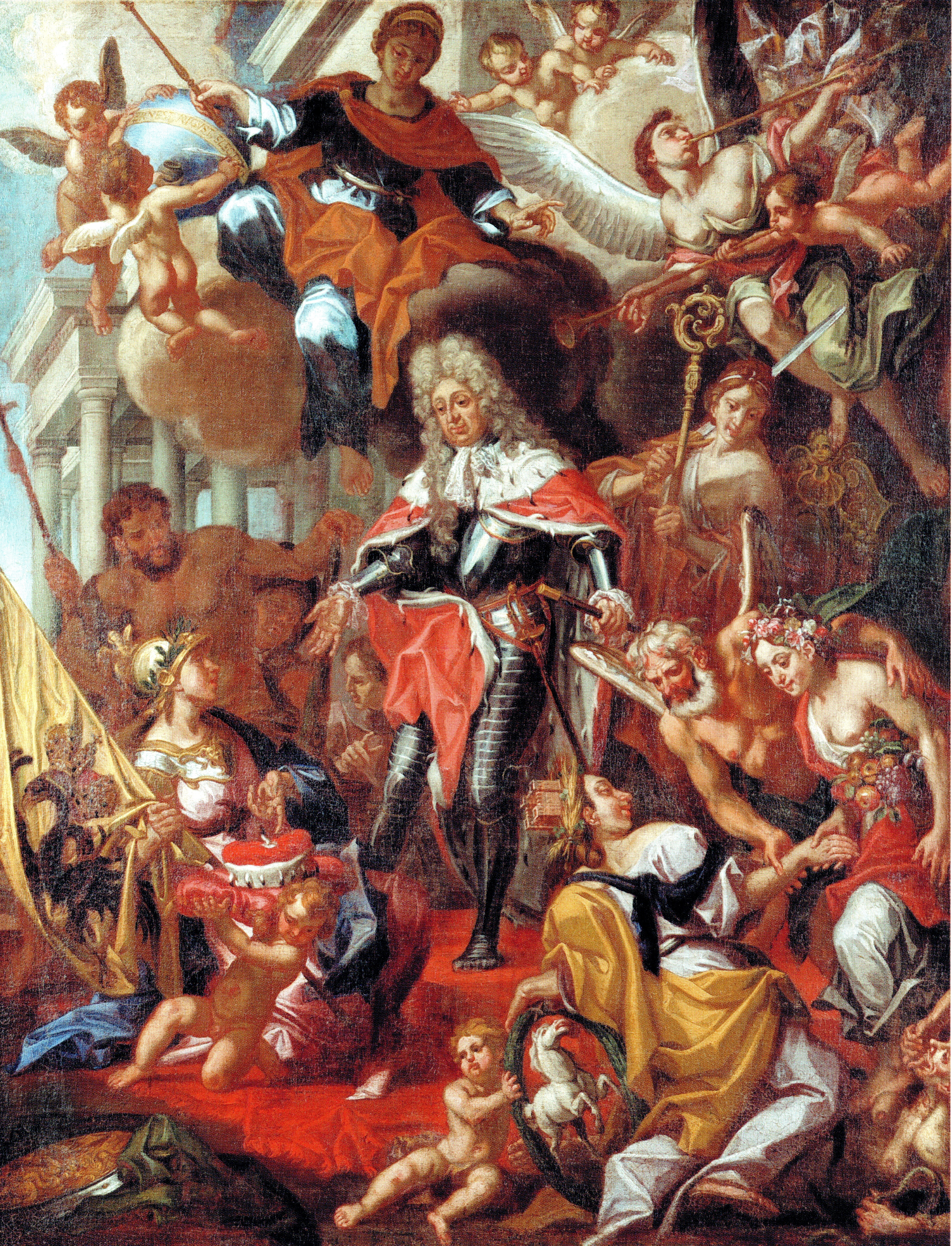 Allegorie auf die Erhebung von Ernst August zum Kurfürst von Braunschweig-Lüneburg 1692.